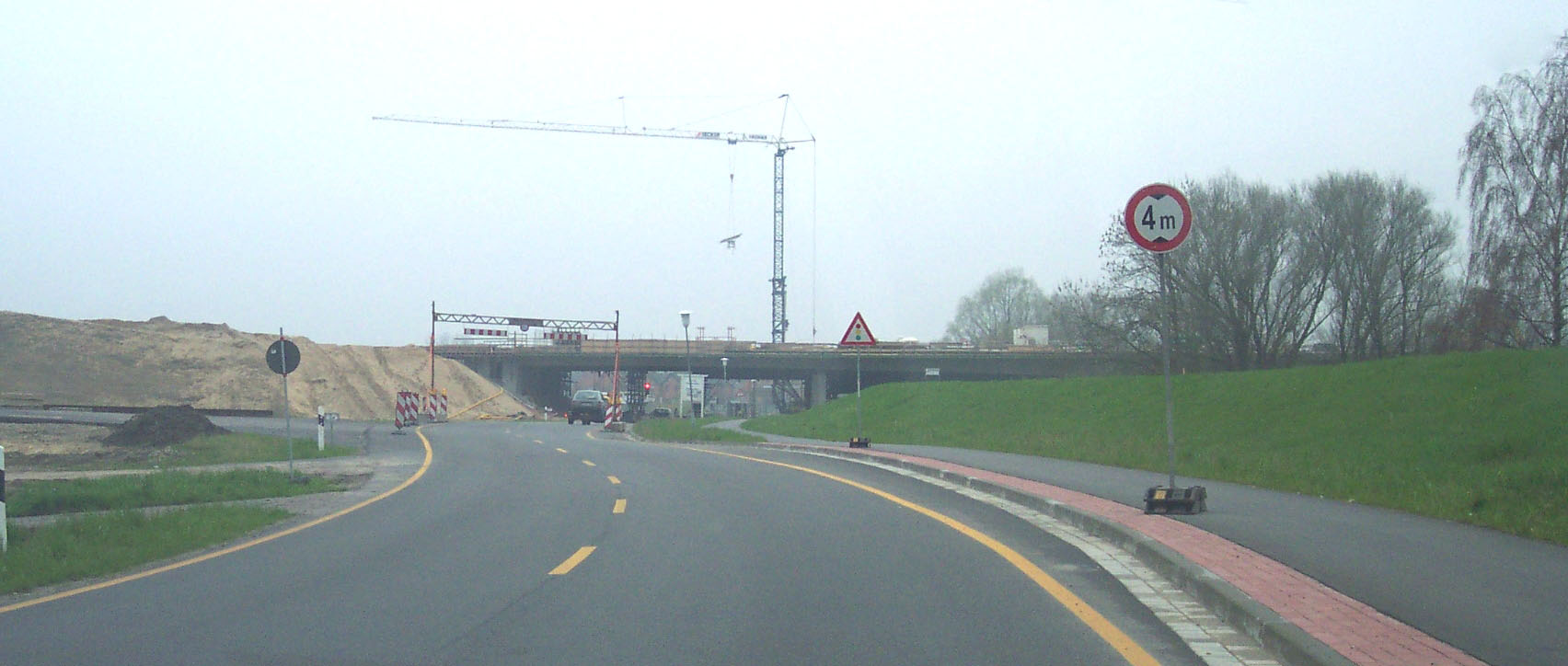 Autobahn A26